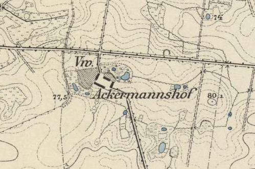 Ackermannshof, Gemeindeteil von Falkenberg/Mark, Landkreis Märkisch-Oderland, Brandenburg, Deutschland, Ausschnitt aus dem Messtischblatt 3249 Heckelberg von 1877